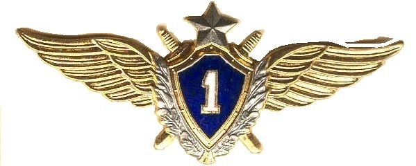 Нагрудный знак классной квалификации "Военный лётчик 1-го класса" образца 1995 года